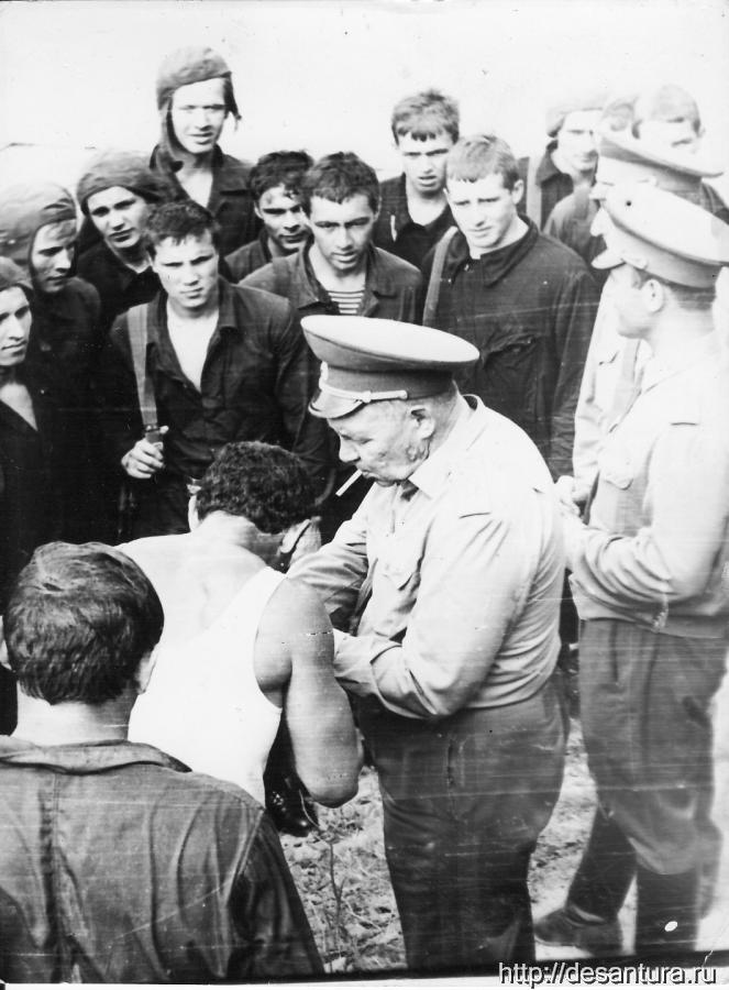 Василий Филиппович Маргелов и курсанты 242-го уц ВДВ, 2 августа 1977 г.